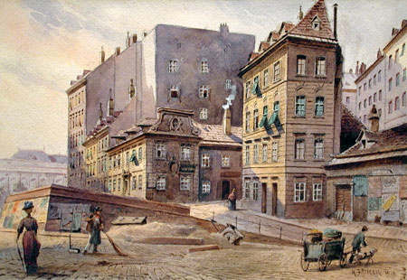 Die Schreyvogelgasse mit dem Dreimäderlhaus